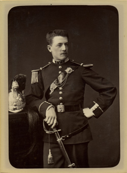 giberne. Title